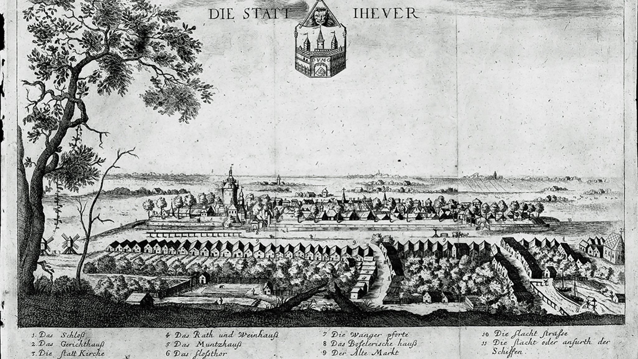 Die Stadt Jever um 1671 auf einer Radierung von Heinrich van Lennep - Die Radierung befindet sich im Besitz des Schlossmuseums Jever